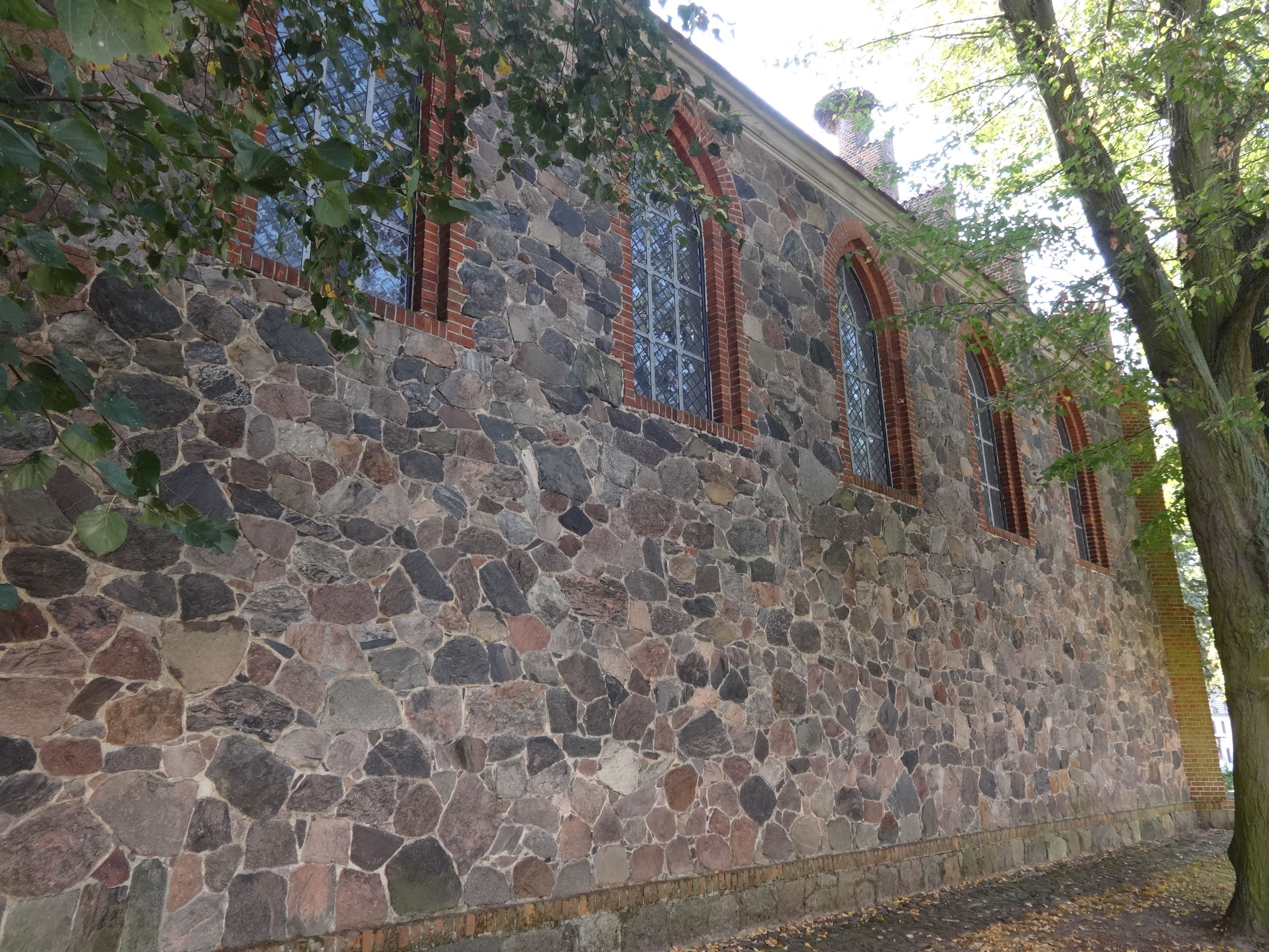 Die evangelische Dorfkirche in Hennickendorf ist eine neugotische Feldsteinkirche in Hennickendorf, ein Ortsteil der Gemeine Nuthe-Urstromtal in Brandenburg. Das Bauwerk entstand 1856 bis 1858 nach Plänen von Stüler vermutlich auf dem Fundament eines Vorgängerbaus aus dem 14. Jahrhundert.